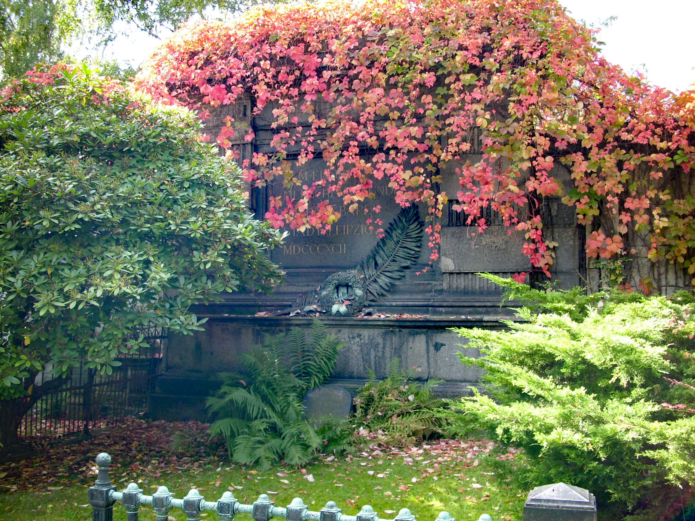 Grabstätte Carl Christian Philipp Tauchnitz auf dem Nordfriedhof in Leipzig